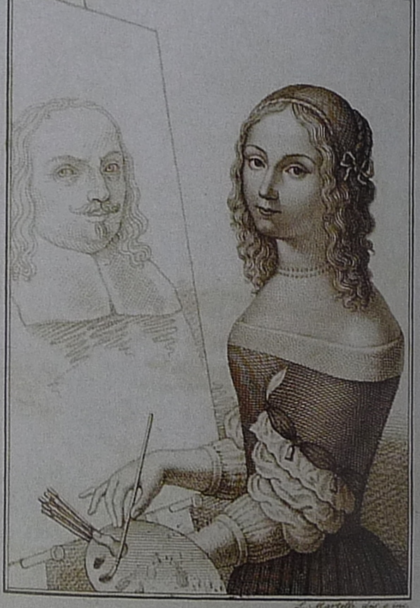 Autoritratto in atto die dipindere il padre